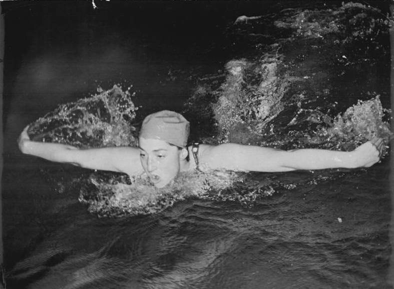 Jutta Langenau-Großmann Zentralbild TBD-Wittig 4 Motive 30.9.1954 DDR-Spitzensportlerin im Schwimmen bei Training in Erfurt UBz: Regelmässig trainiert Jutta Langenau-Großmann im Erfurter Hallenschwimmbad.